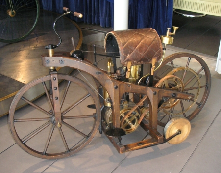 Das erste Motorrad der Welt. Daimler Reitwagen von 1885 (Nachbau im Mercedes-Benz-Museum Stuttgart Untertürkheim)